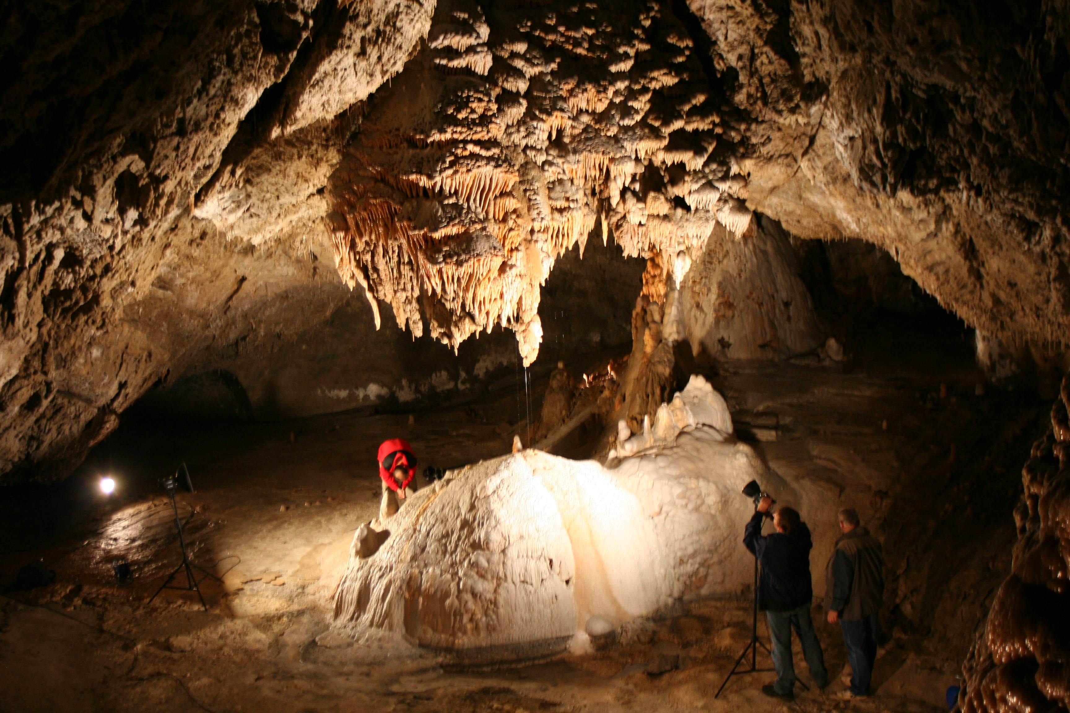 Demänová Cave of Freedom (Demänovská jaskyňa Slobody), Slovakia.